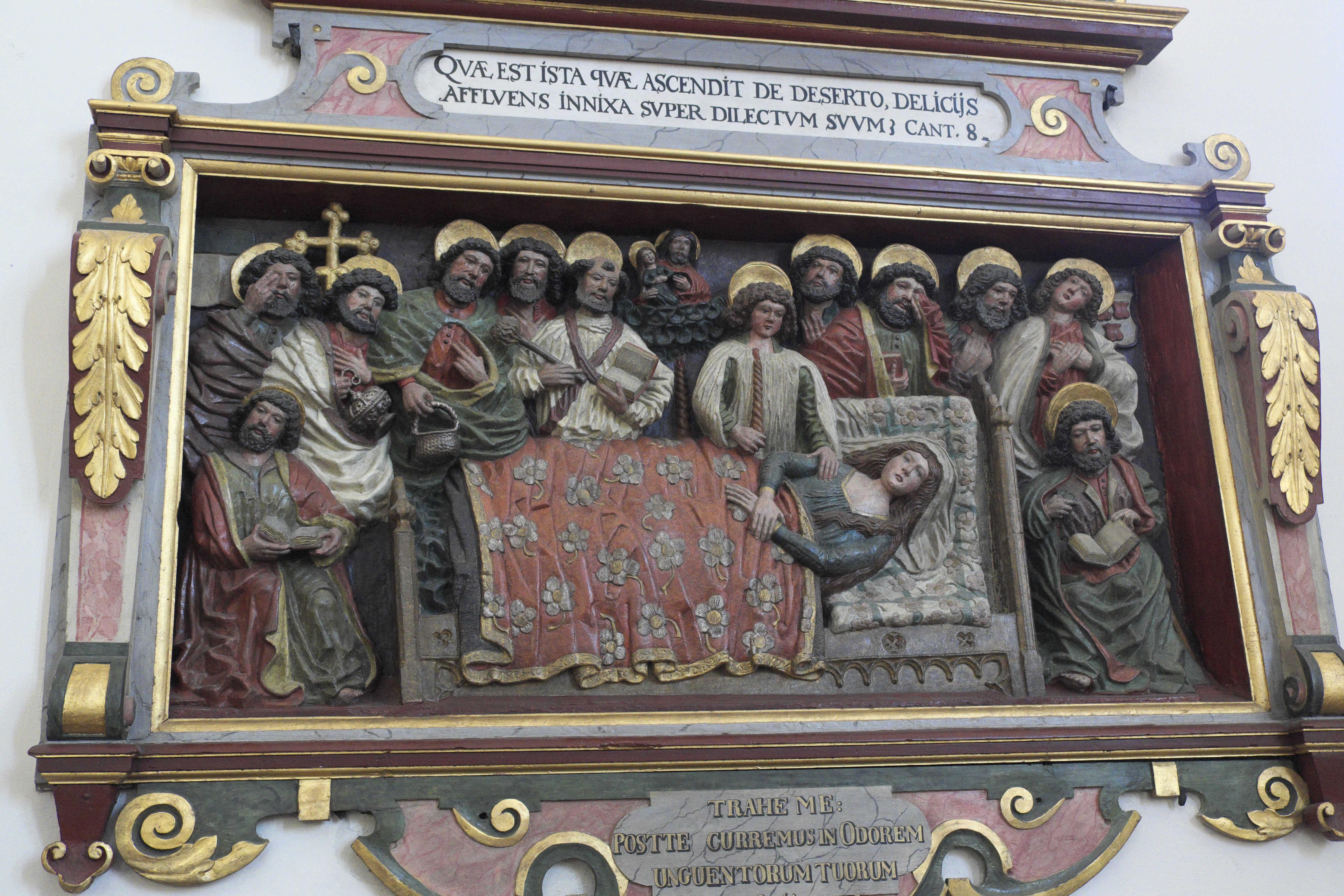 Katholische Pfarrkirche Mariä Himmelfahrt in Engen im Landkreis Konstanz (Baden-Württemberg/Deutschland), Sandsteinrelief, um 1500; Darstellung: Marientod